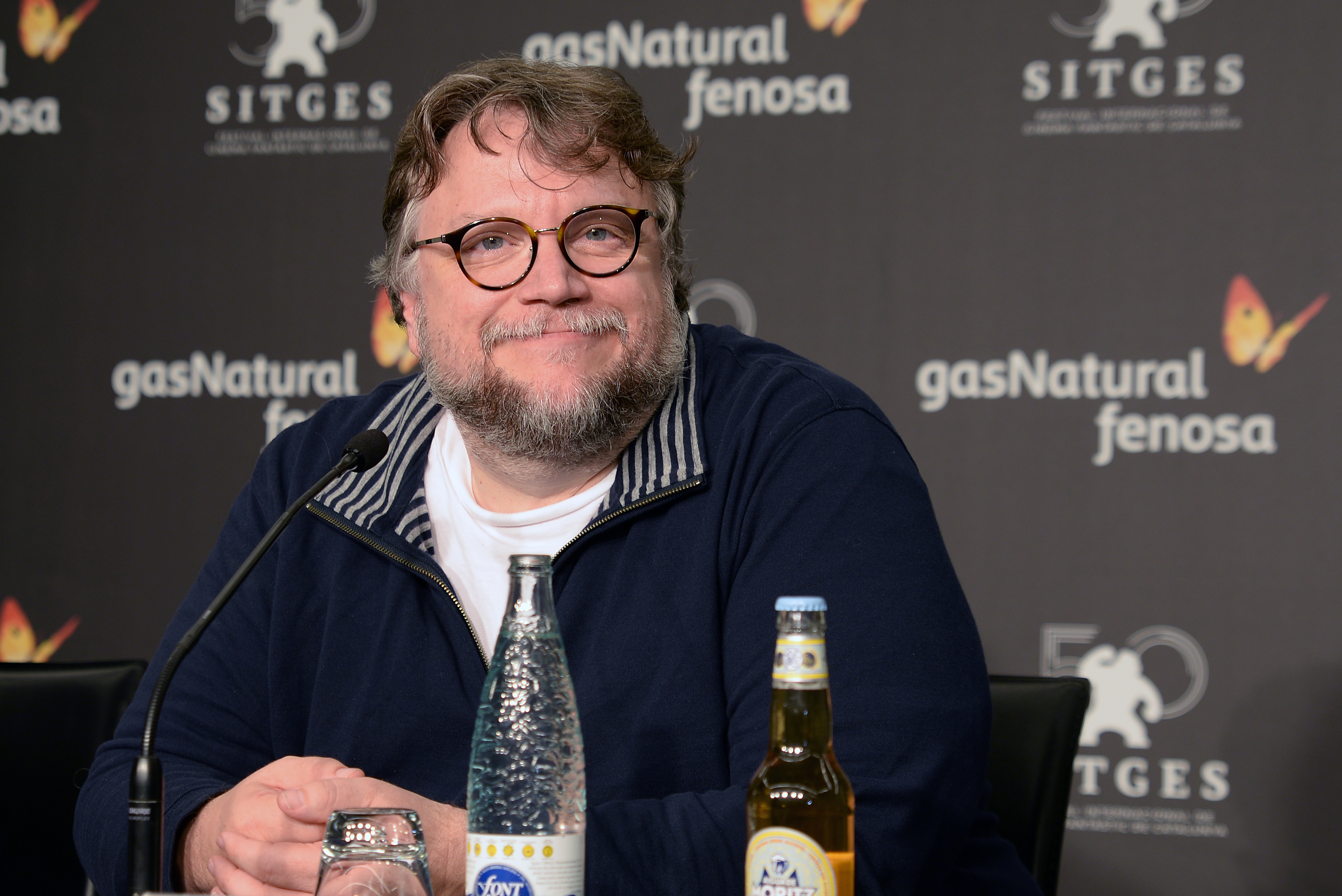 Guillermo del Toro, fotografiat durant el Festival Internacional de Cinema Fantàstic de Catalunya (Sitges, 2017)